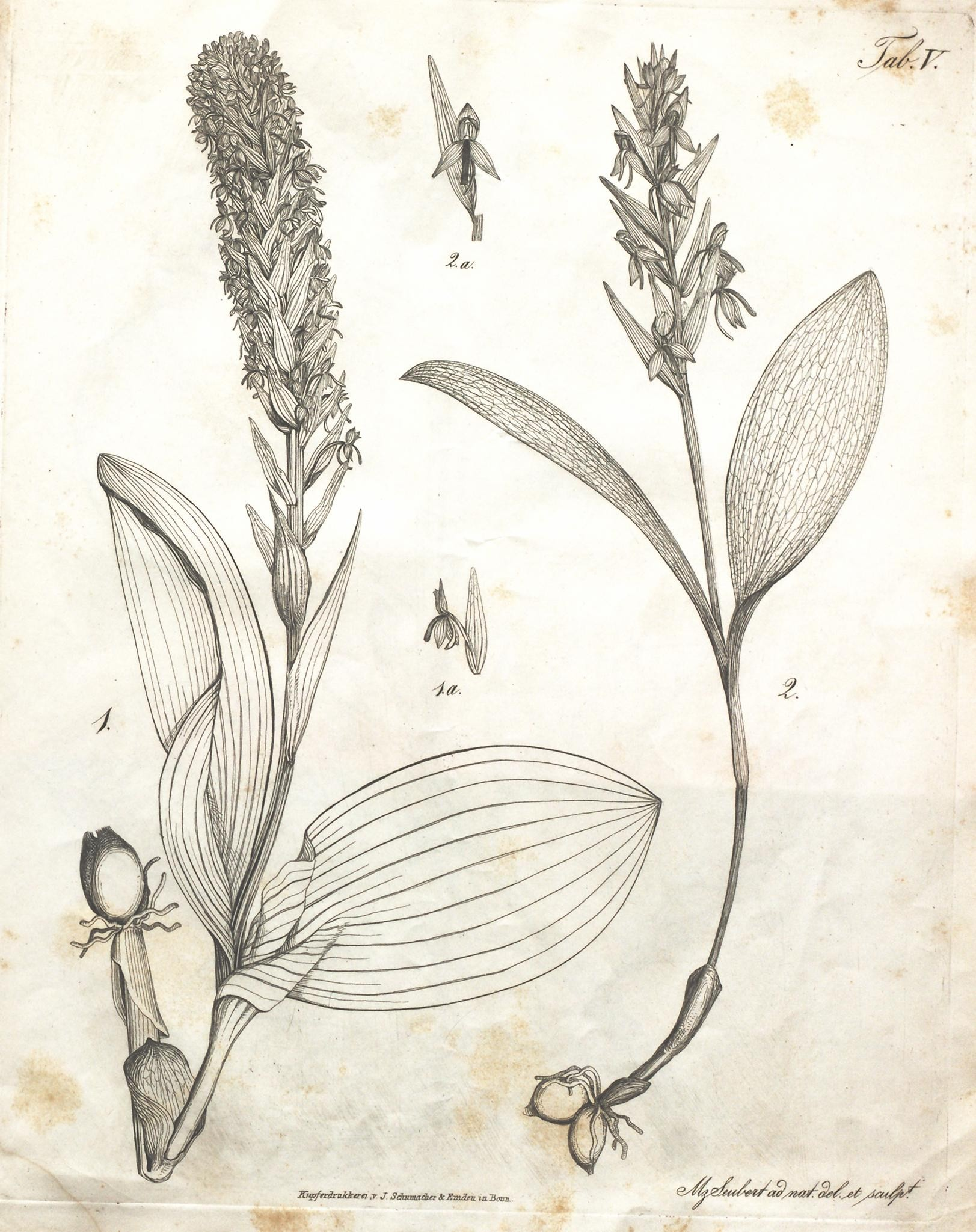 JTnpfrrgrttJckeM ,r J Sdauta&rr kRm&a. la Soaa